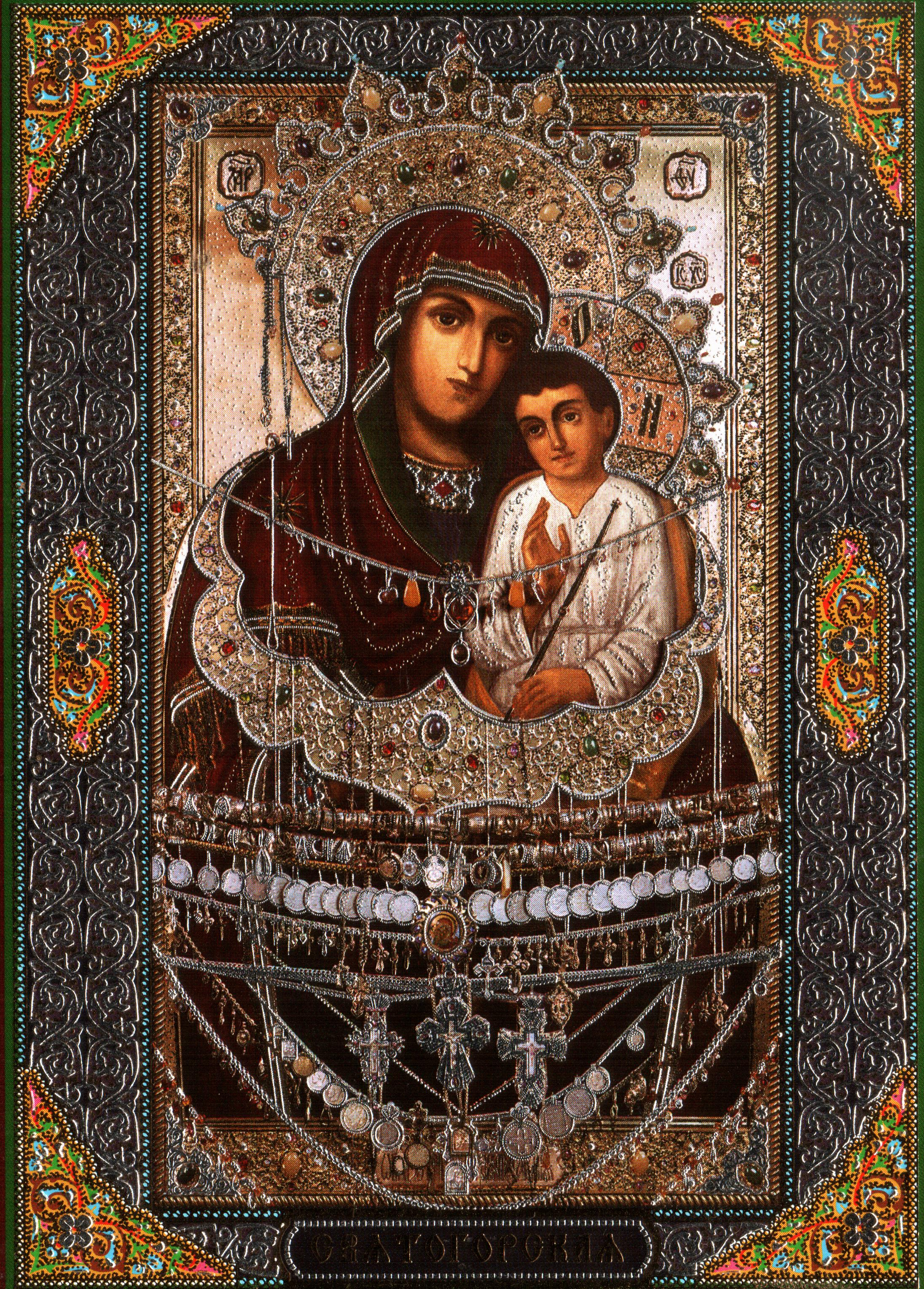 [Образ Пресвятыя Богородицы] Святогорская. Чудотворная икона (репродукция Донецкой епархии по дореволюционной фотографии).